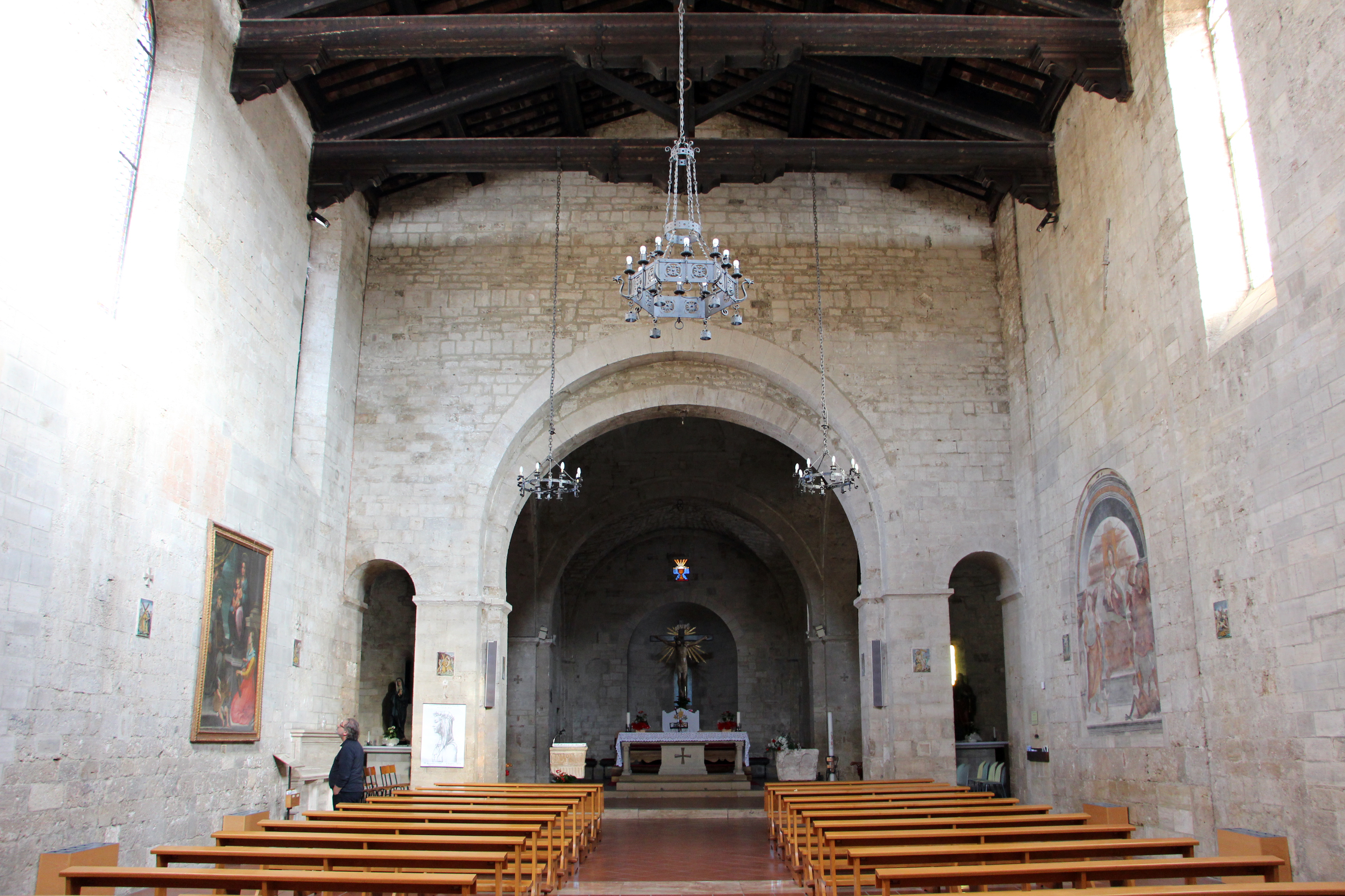 Asciano (si)